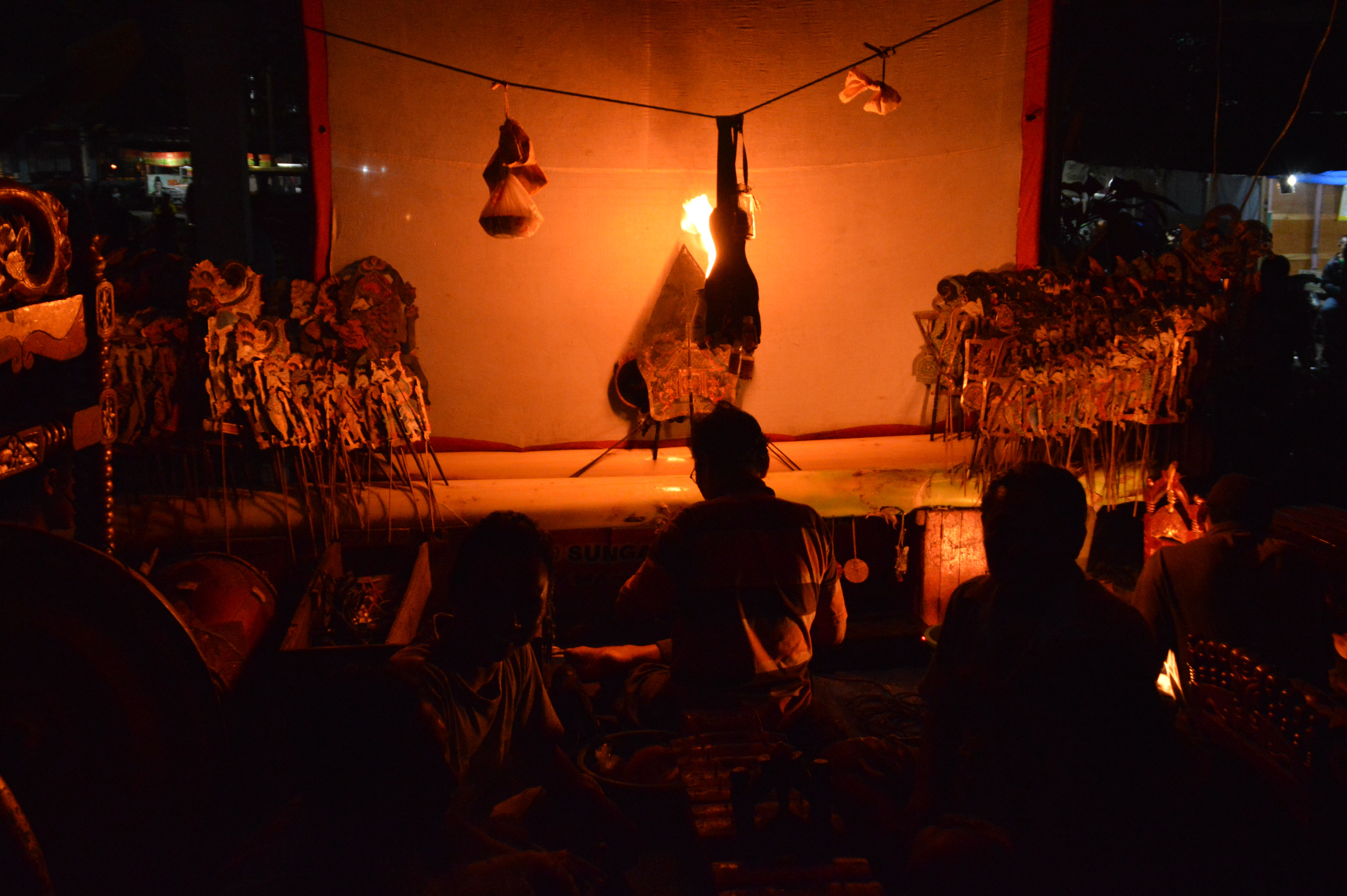 Pertunjukan Wayang Banjar oleh Sanggar Seni Asam Rimbun desa Pantai Hambawang Timur, Kabupaten Hulu Sungai Tengah.